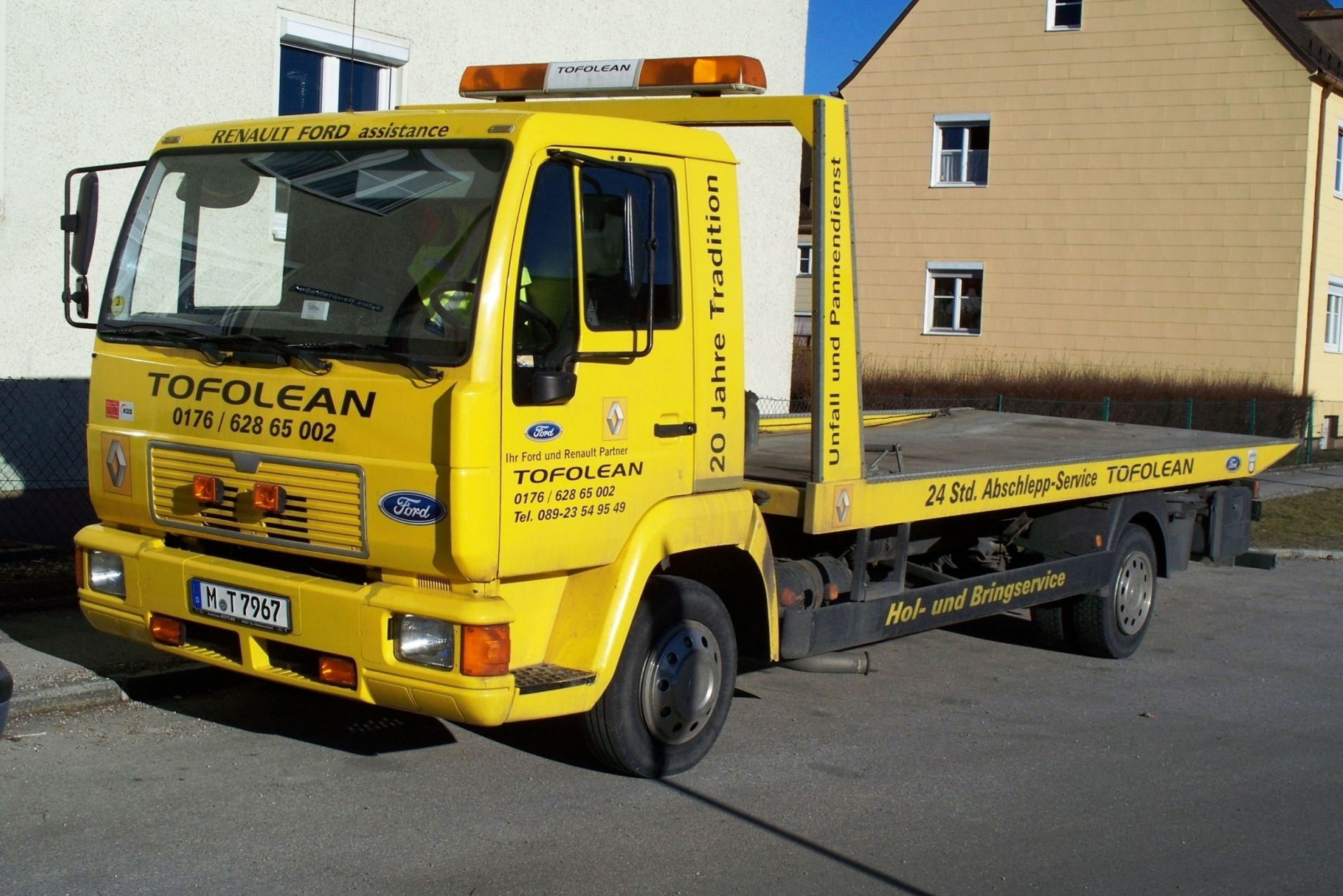 MAN L2000 LKW als Abschleppfahrzeug.